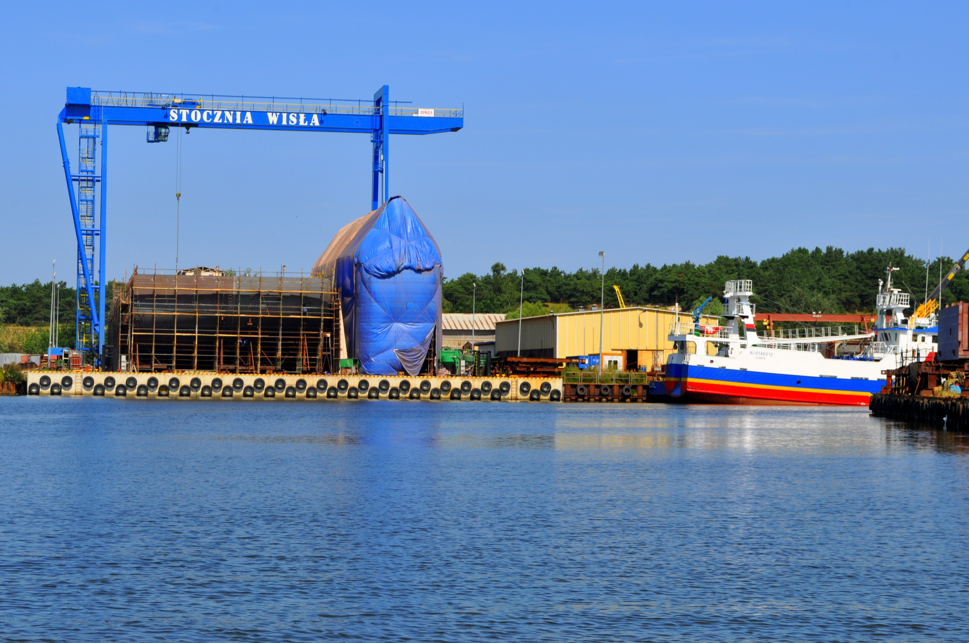 Gdańsk, Stocznia Wisła.